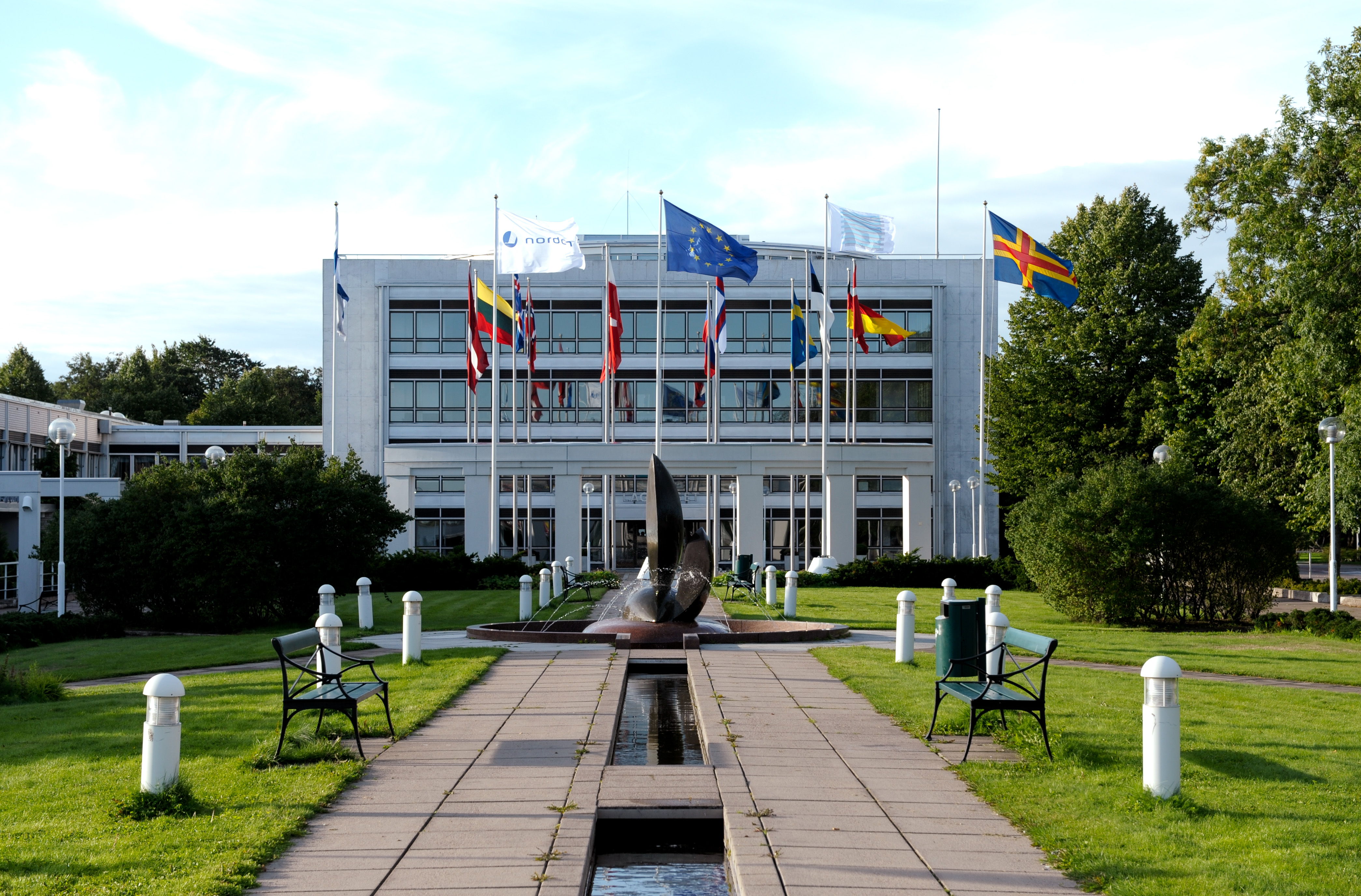 Ålands Lagting BSPC 19